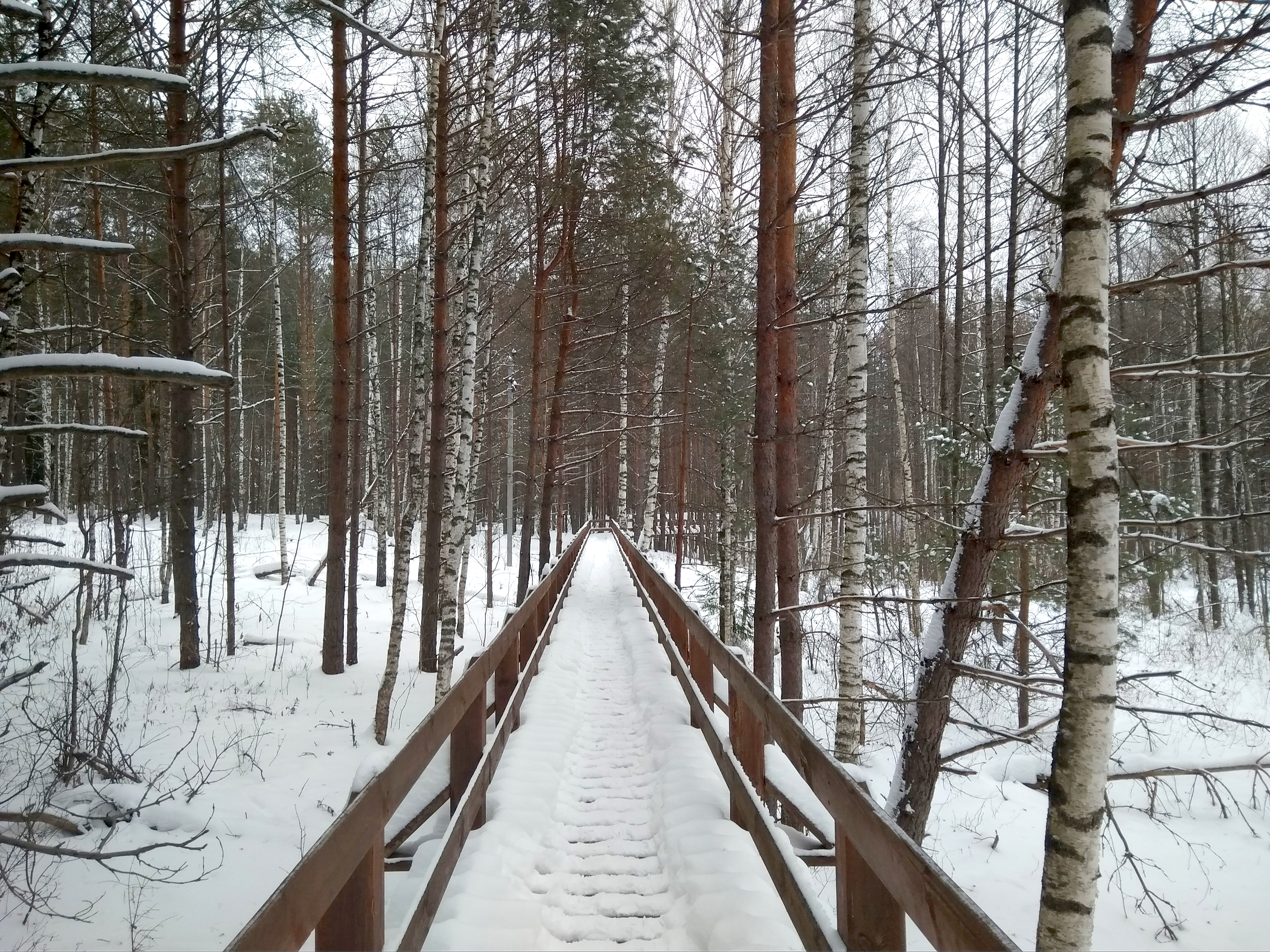 Кольцевая туристическая тропа длиной 1,5 км, начинающаяся от визит-центра в посёлке Пушта. Оборудована деревянным настилом с перилами и информационными стендами. Также есть смотровая площадка на озере.